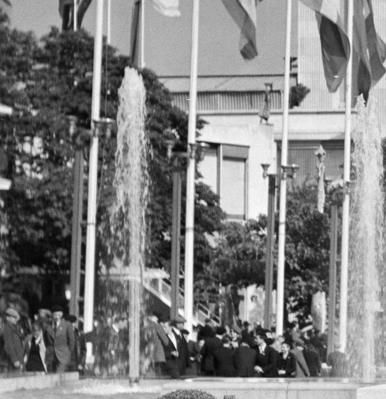 Collectie / Archief : Fotocollectie Van de Poll Reportage / Serie : Wereldtentoonstelling Parijs 1937 Beschrijving : Het Duitse paviljoen en de Eiffeltoren met waterpartij en fonteinen en vlaggen Datum : 1937 Locatie : Frankrijk, Parijs Trefwoorden : architectuur, fonteinen, torens, vlaggen, wereldtentoonstellingen Fotograaf : Poll, Willem van de, [onbekend] Auteursrechthebbende : Nationaal Archief Materiaalsoort : Negatief (6x6) Nummer archiefinventaris : bekijk toegang 2.24.14.02 Bestanddeelnummer : 254-2681